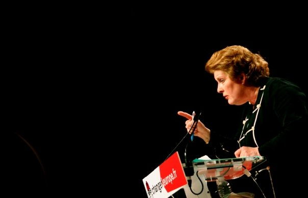 Catherine Trautmann meeting campagne européene 2009